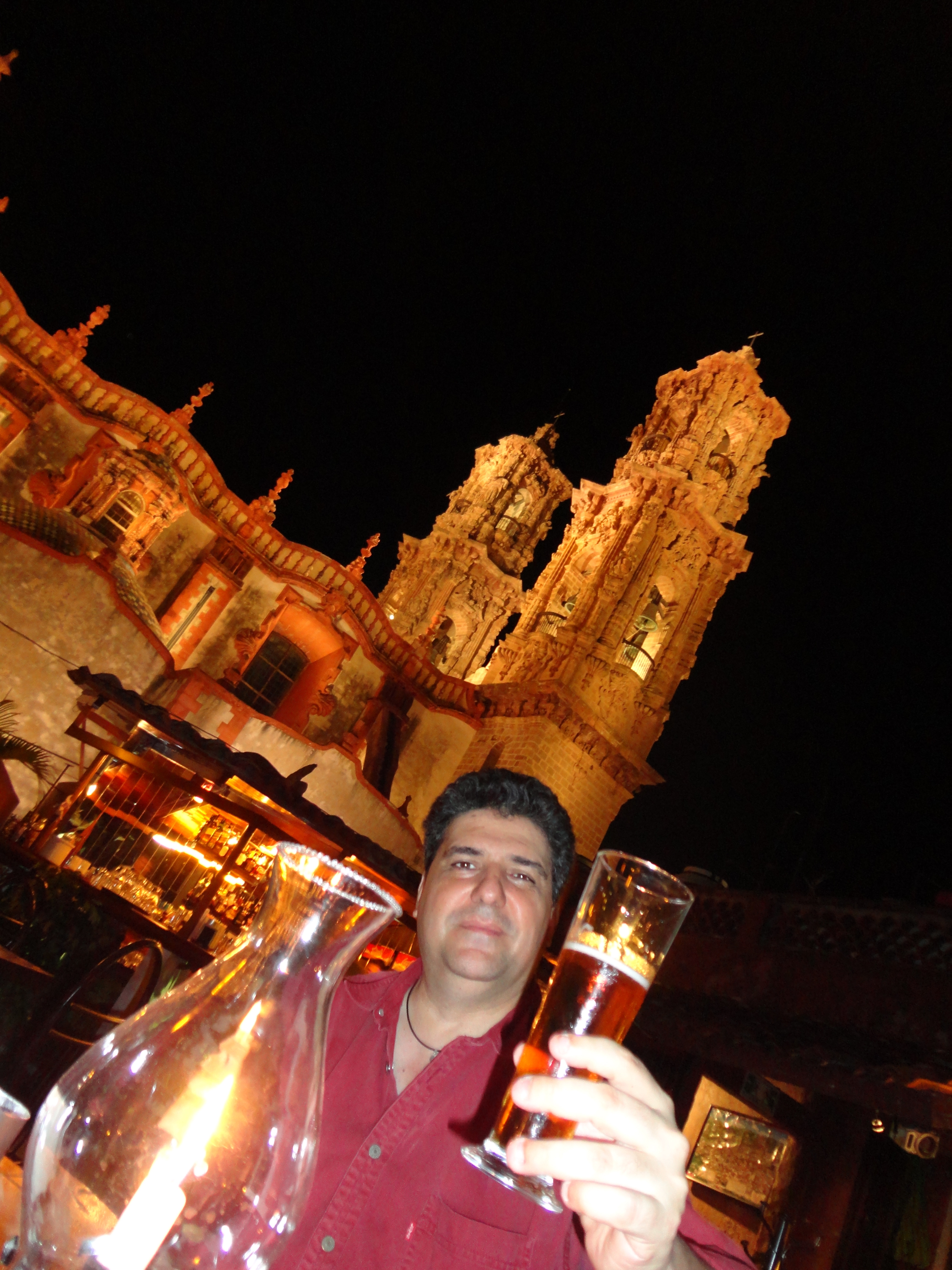 Foto Gustavo Ott